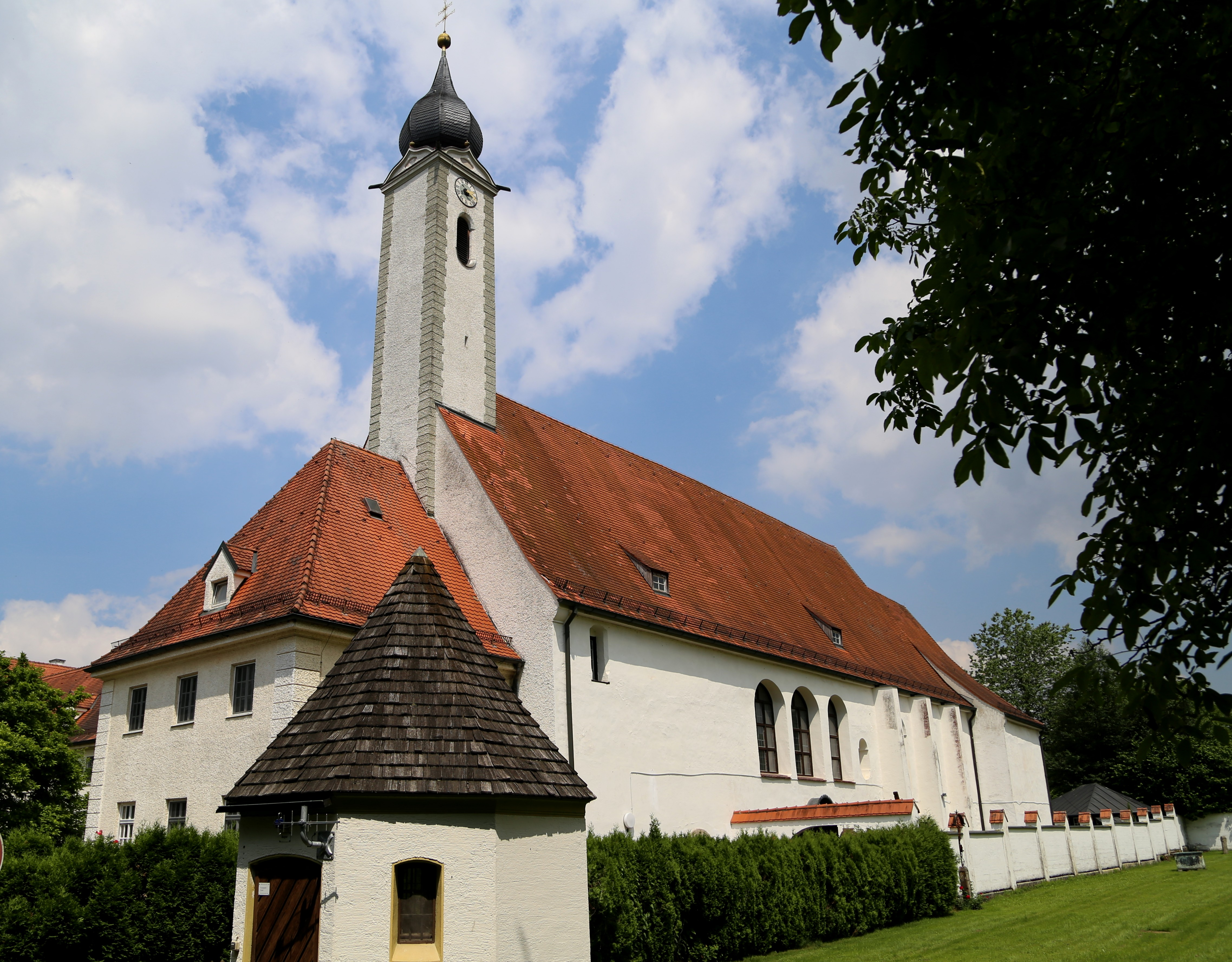 Altenhohenau 10; Dominikanerinnen-Klosterkirche St. Peter und Paul, Saalbau mit eingezogenem Chor und westlichem Dachreiter mit Zwiebelhaube, barocker Neubau um 1670/75 unter Einbeziehung älterer Teile seit 1235, Apsis, Chor und Langhaus- Außenmauern romanisch, Rokoko-Ausbau 1765/74, Turm 1773; mit Ausstattung.